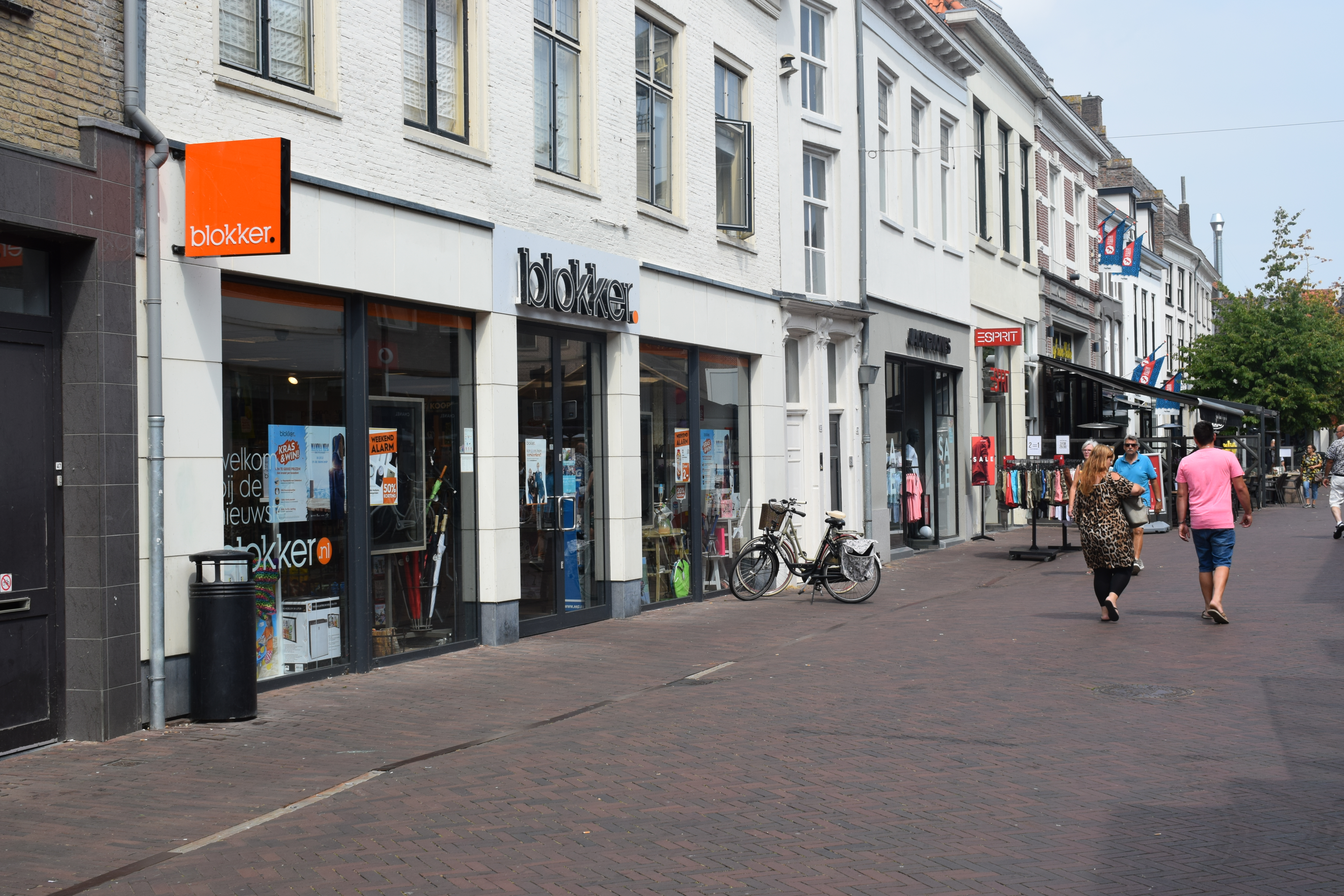 Vue de Harderwijk en Gueldre (Pays-Bas).